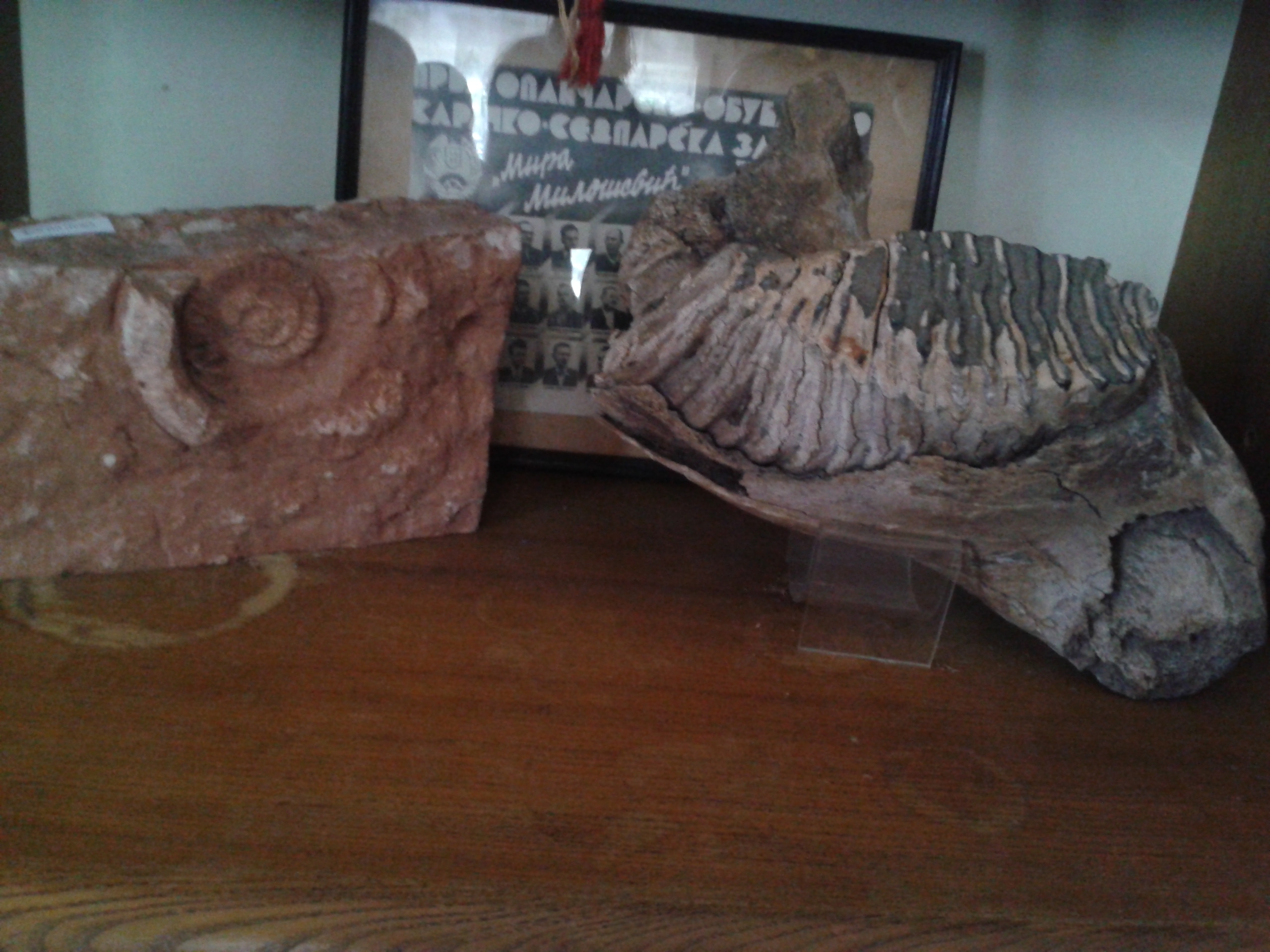 Srpski (latinica): Izlozba u trstenickom muzeju